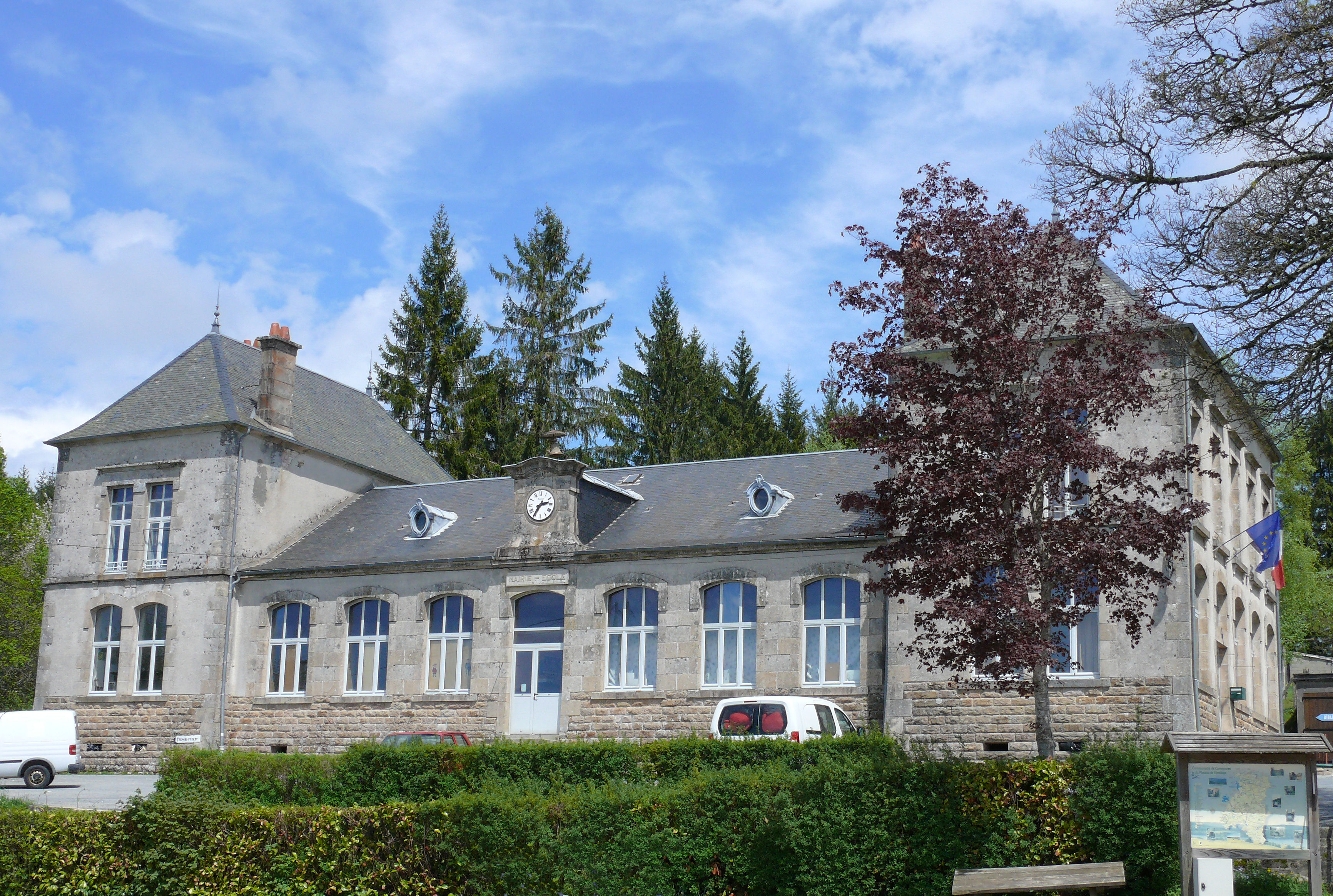 Gentioux-Pigerolles - Mairie-école